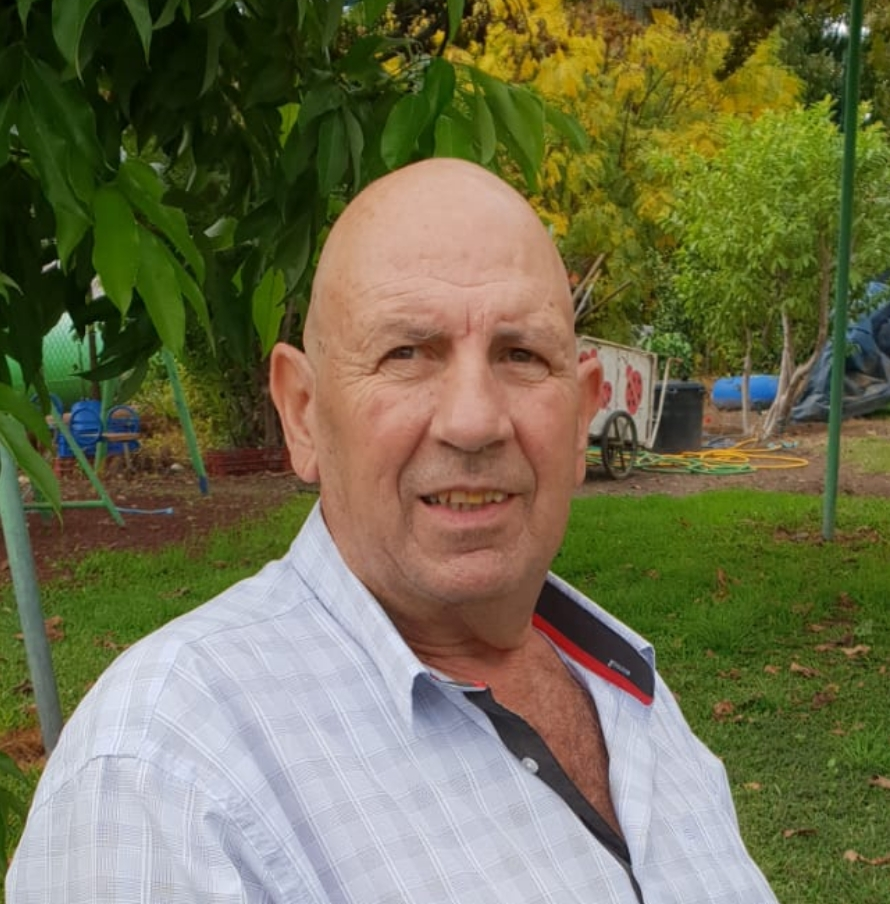 גבי טייכנר, 2018